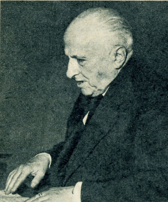 Guido Alberto Fano compositore